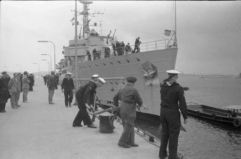 Ankunft des dänischen Flottenverband von 14 Schiffen mit 800 Mann Besatzung zur Kieler Woche 1963. Im Bild der Tender AEGIR (A 560, dän.).